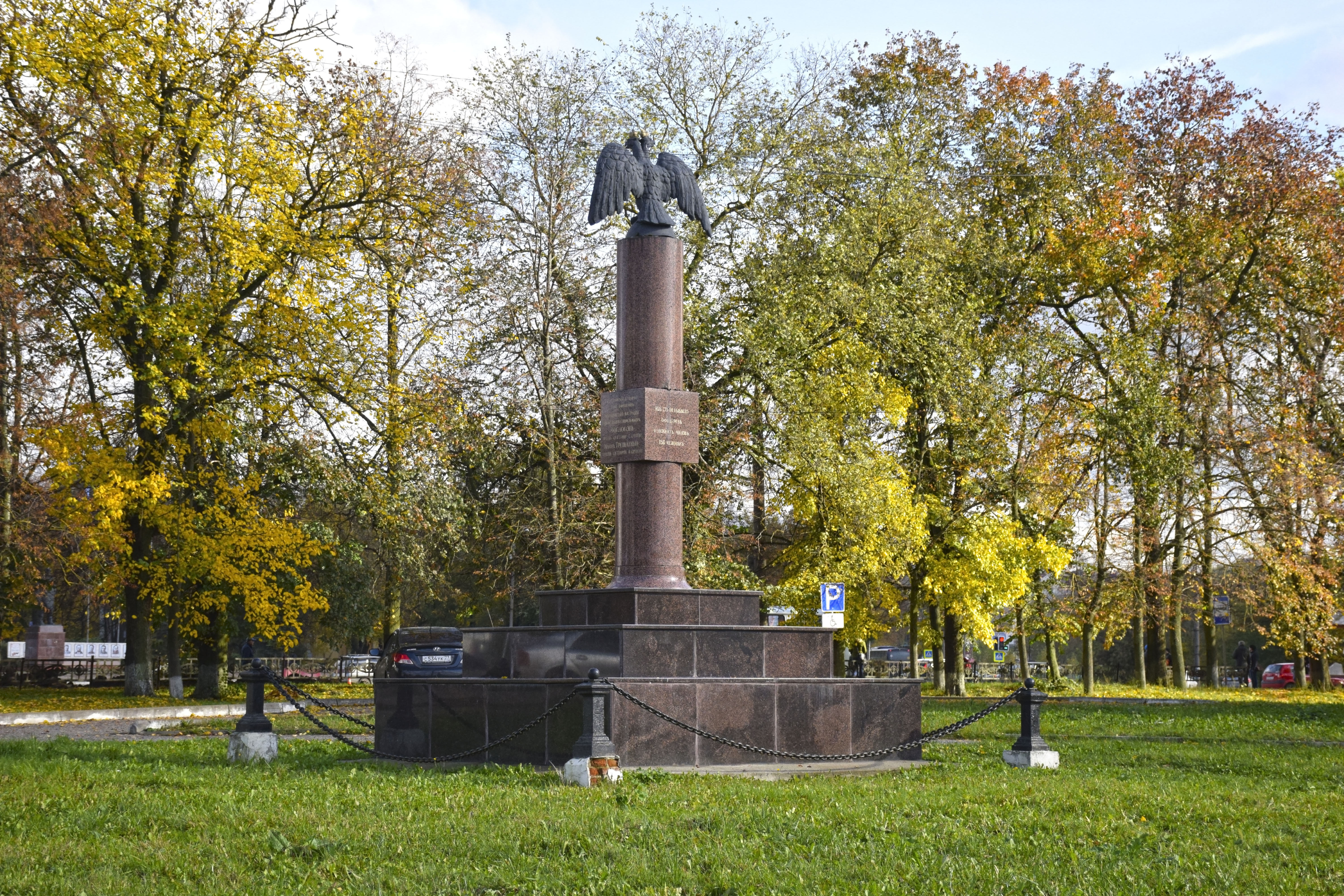 Памятник Перновскому полку: Советская площадь, Вязьма, Вяземский район, Смоленская область